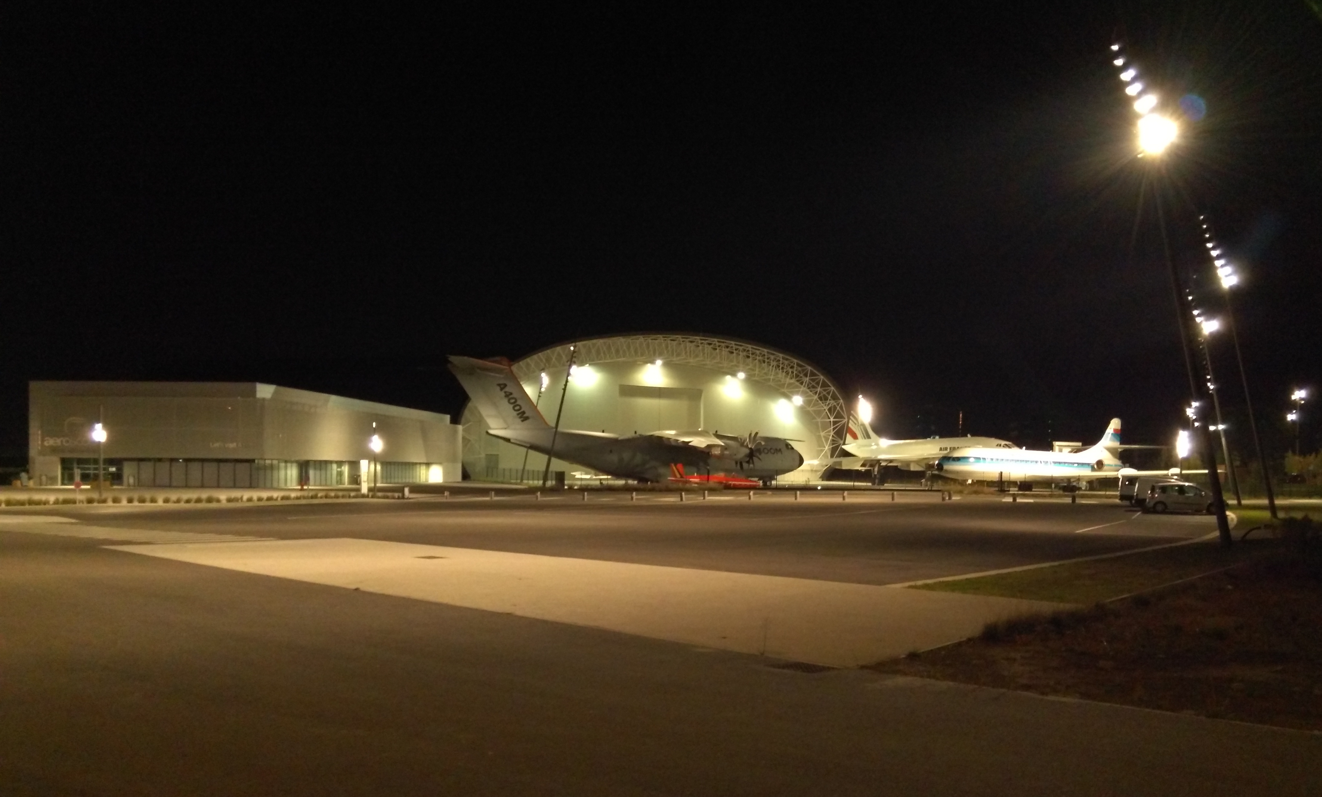 Vue du musée Aeroscopia de nuit.